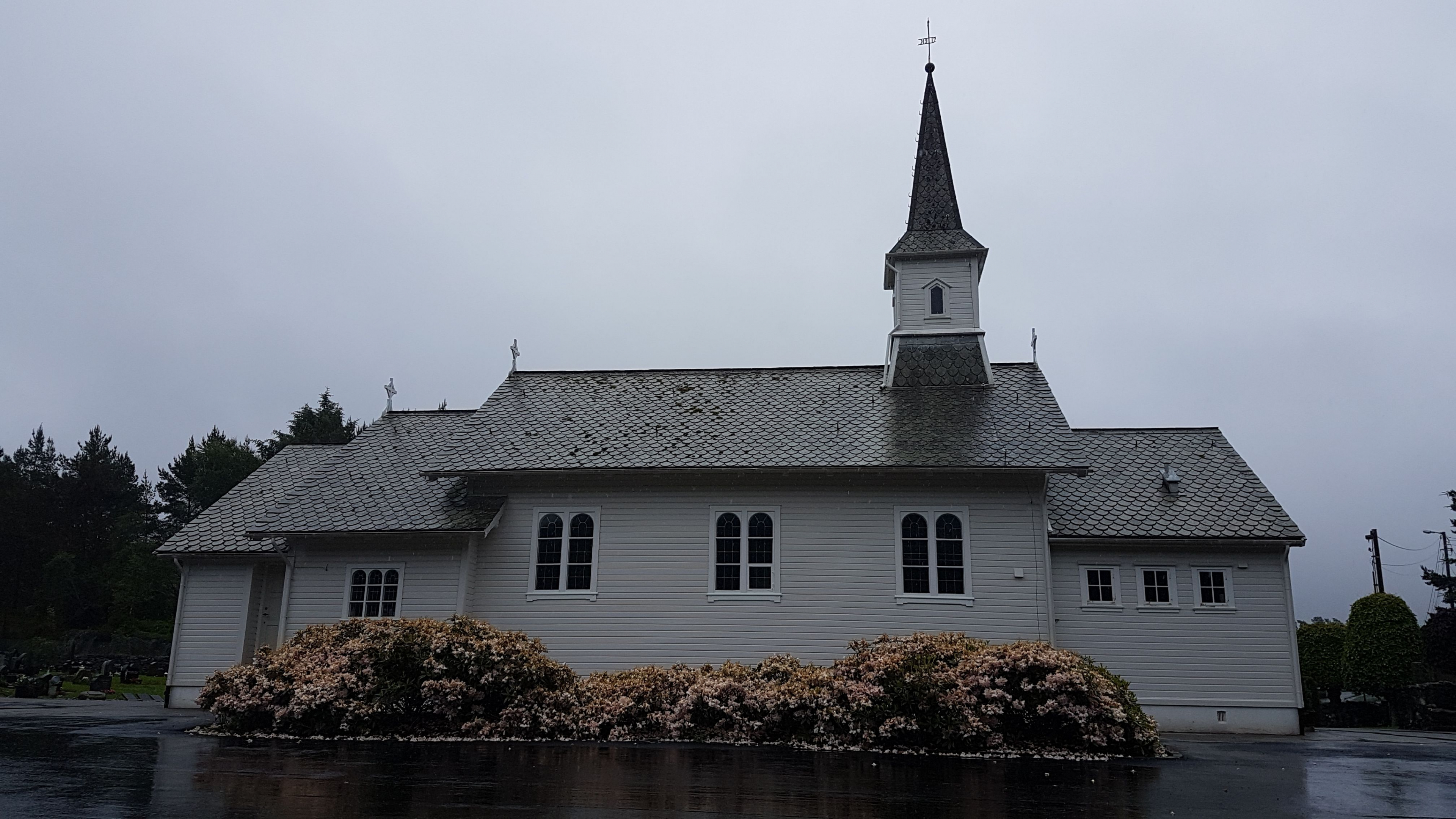 Lykling kirke. Foto: Roger Grimelid. Fra Riksantikvarens Kulturminnesøk.